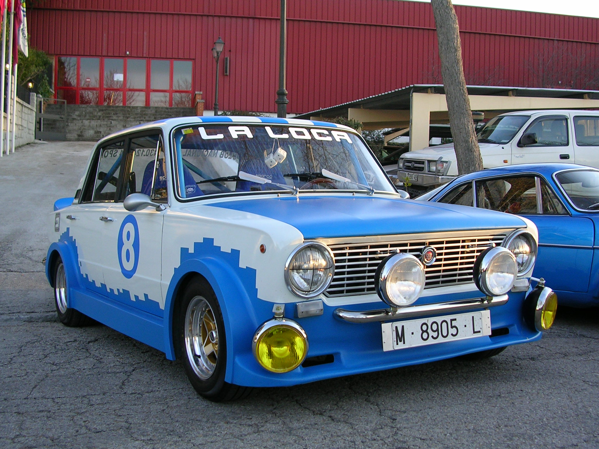 otra loca